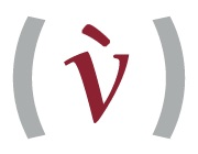 Logo parecido al del Consejo Valenciano de Cultura